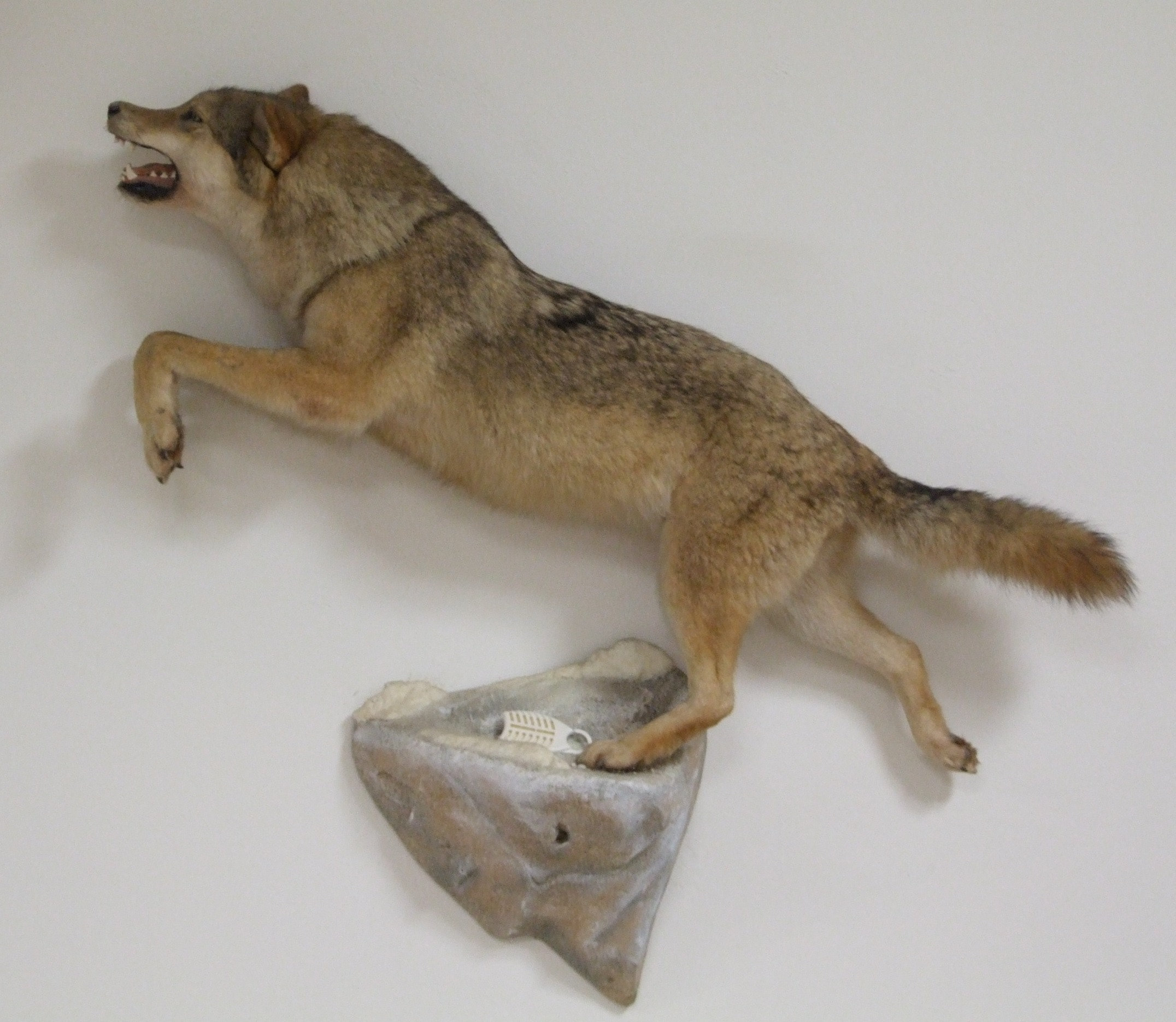 Loup, Musée du château de Montbéliard, Montbéliard, Doubs, Franche-Comté, FRANCE